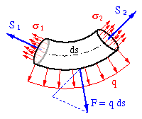 Stueck eines Seils